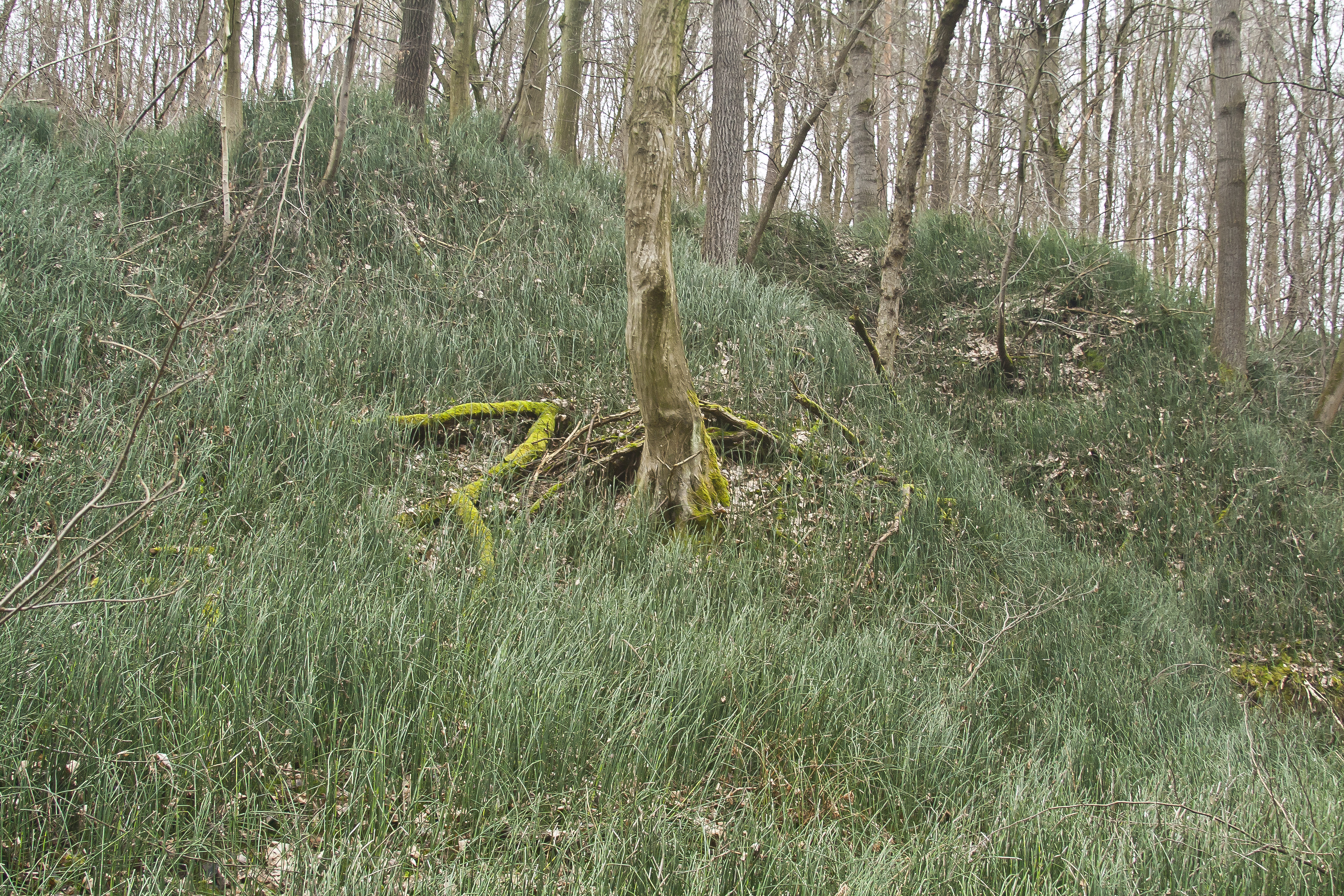 Zbocza wąwozu porośnięte Skrzypem